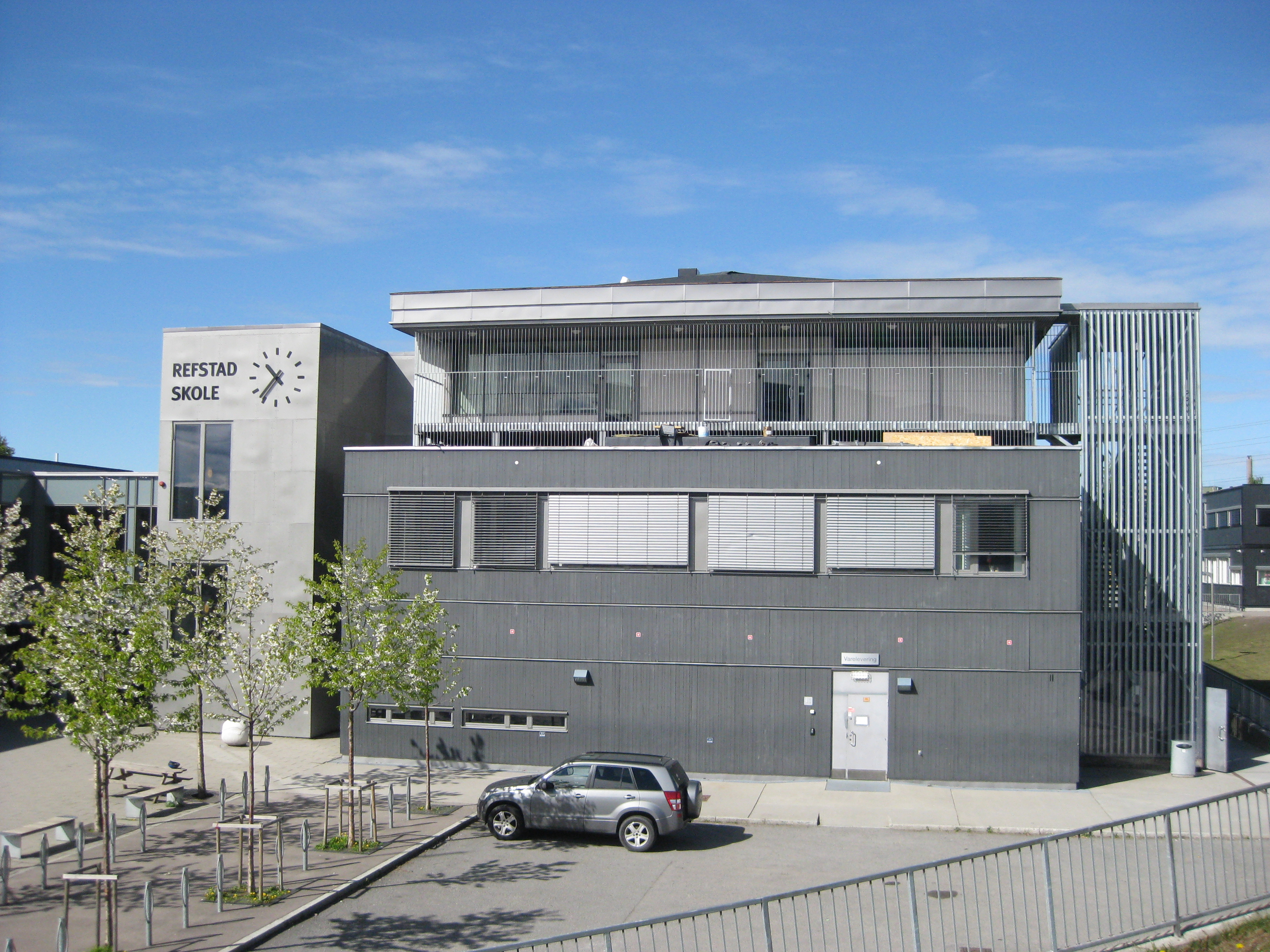 Refstad skole er en 1–7 skole (barneskole) i bydel Bjerke i Oslo.